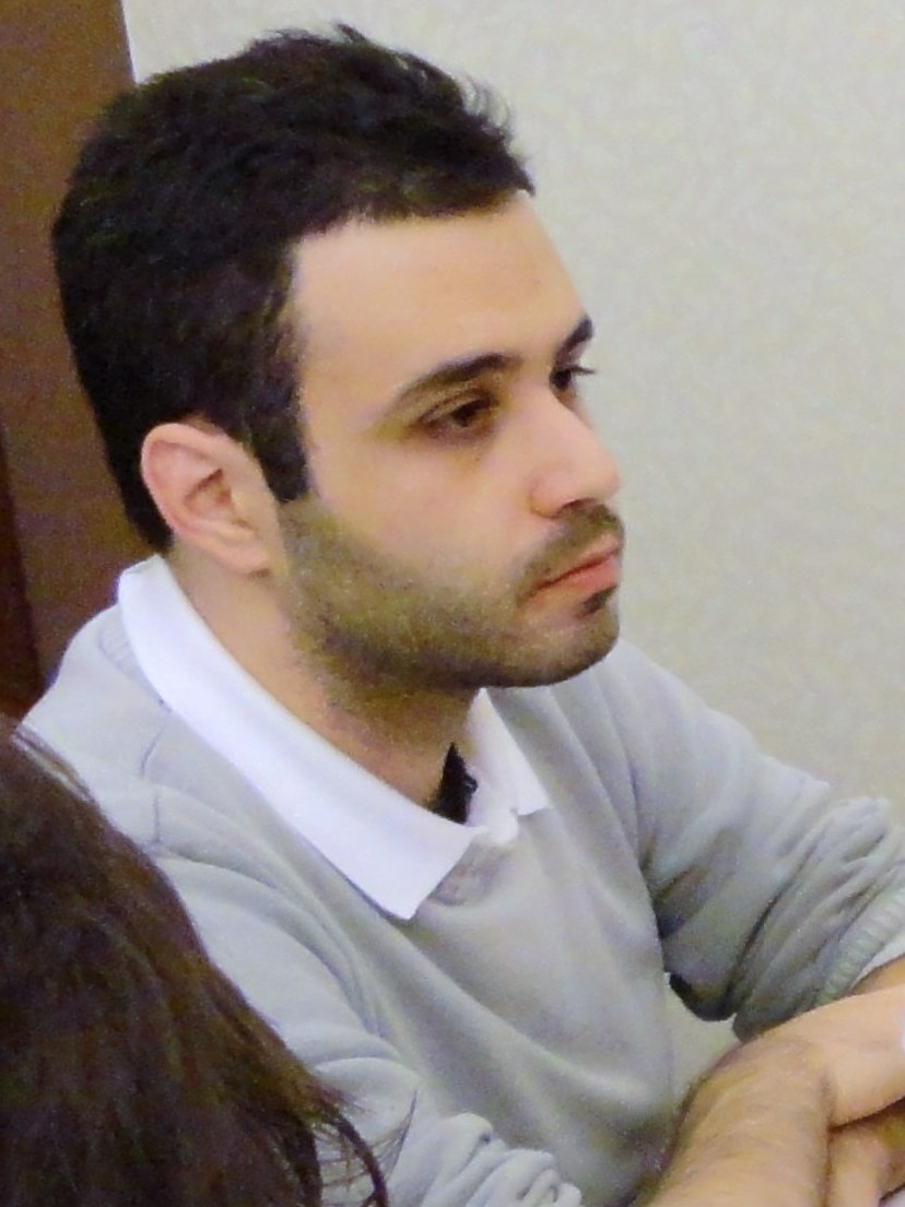 Felipe EL Debs, Schachfestival Basel 2014